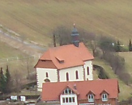 Kath. Kirche Fretterode